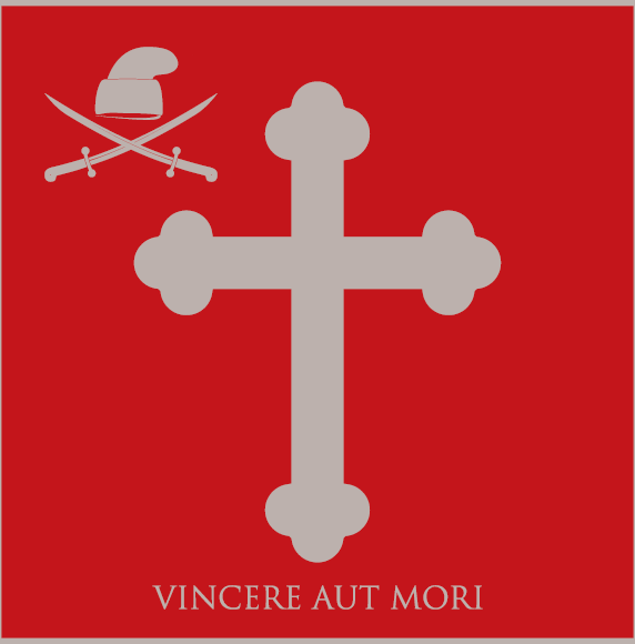 Moderna rekonstrukcija ratne zastave žumberačkih uskoka prema opisu dr. Janka Šimraka.